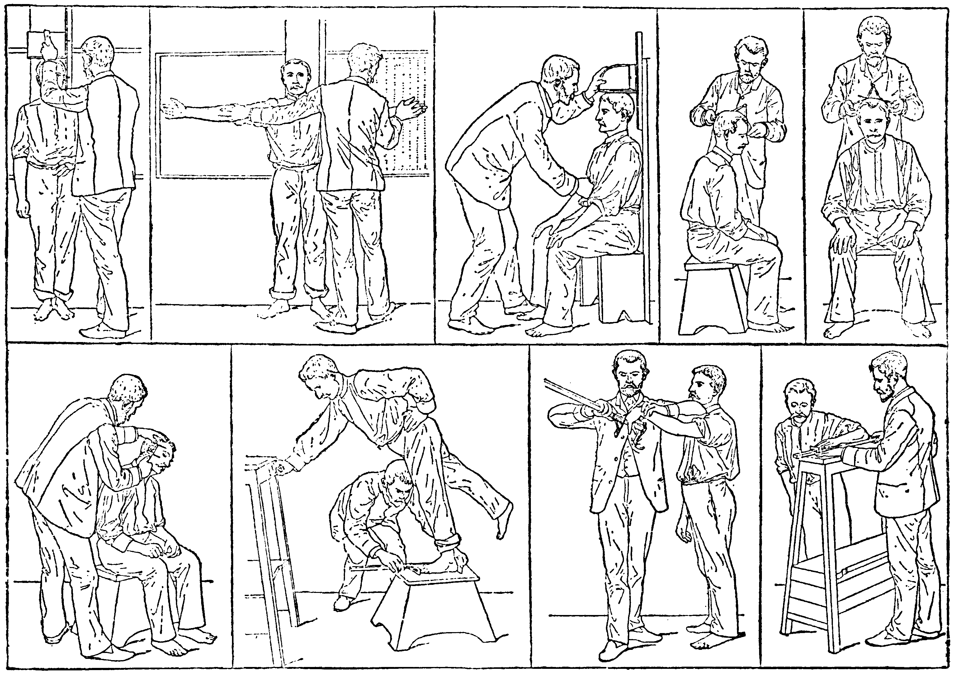 Mätningar för Bertillons antropometriska signalemang (se art. Bertillon 3).